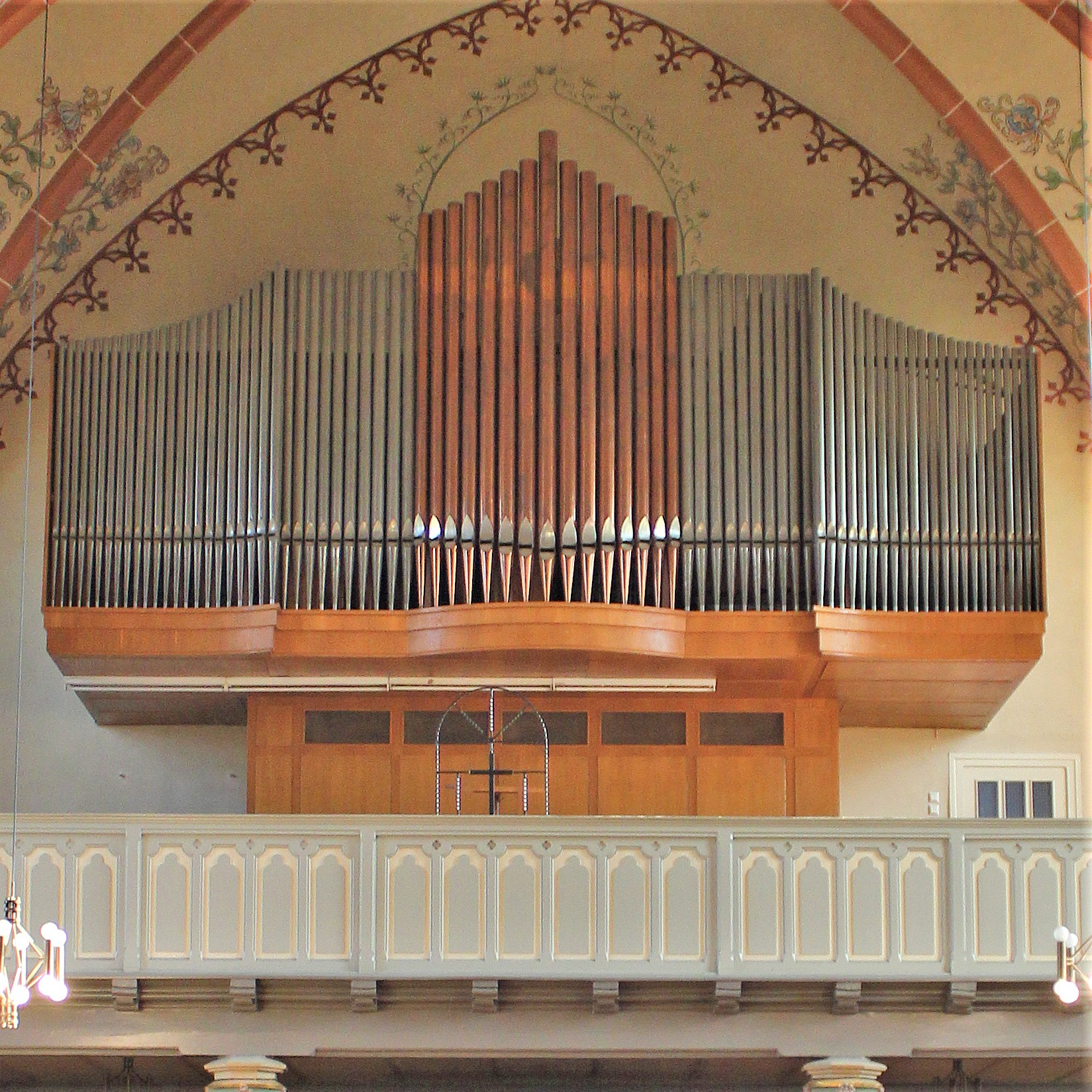 Orgelprospekt der katholischen Pfarrkirche St. Leodegar in Düppenweiler, einem Ortsteil der Gemeinde Beckingen, Landkreis Merzig-Wadern, Saarland